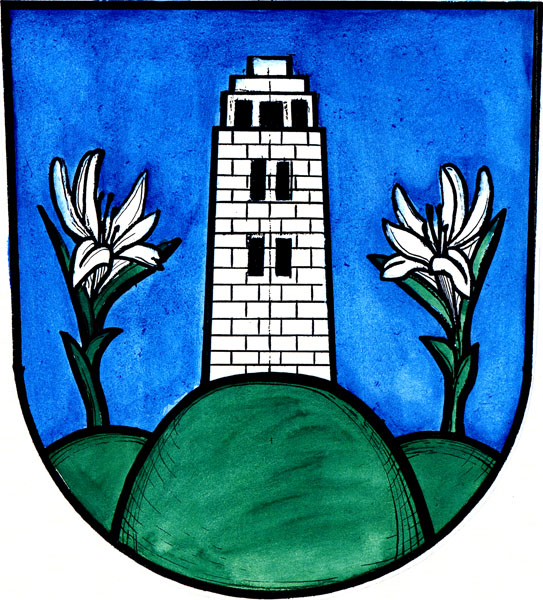 Znak obce Úvalno